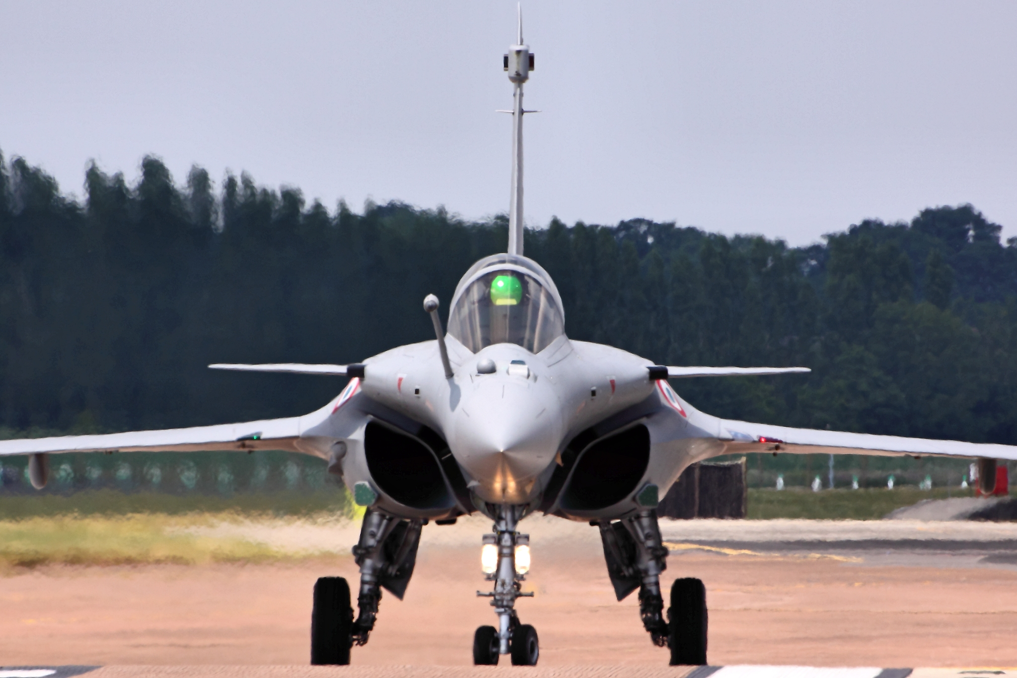 Rafale - RIAT 2013